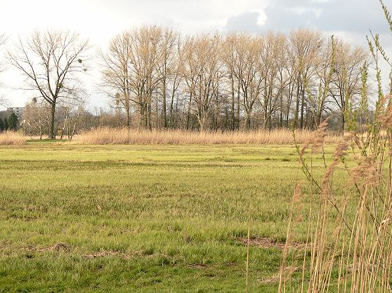 Drömlingswiesen bei Wolfsburg-Vorsfelde, NSG Wendschotter und Vorsfelder Drömling, April 2005